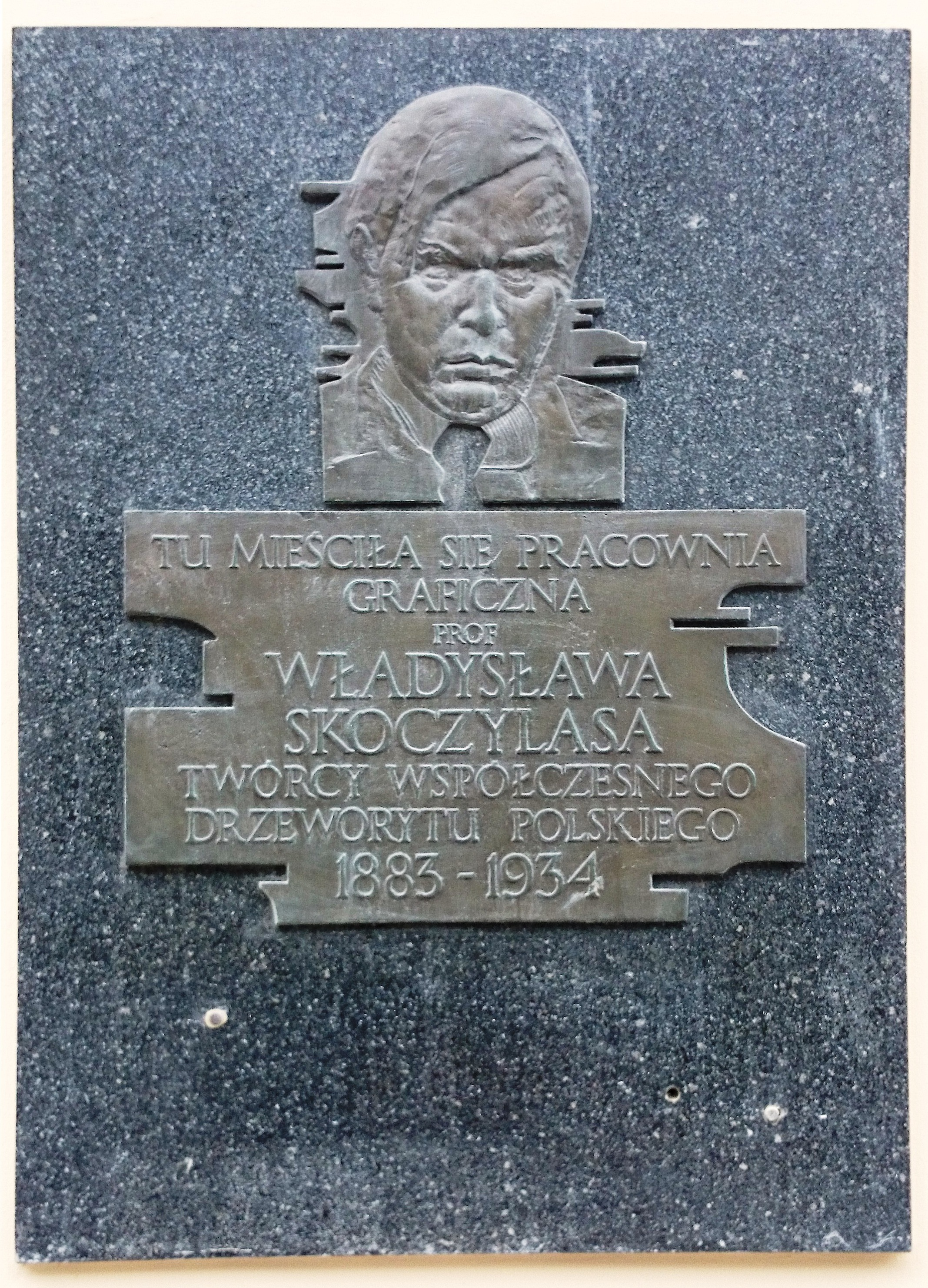 Tablica poświęcona Władysławowi Skoczylasowie na elewacji budynku przy ul. Wybrzeże Kościuszkowskie w Warszawie